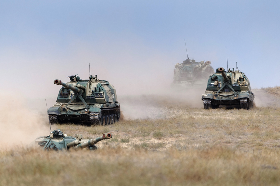 Батарея САУ 2С19 17-й отдельной гвардейской мотострелковой бригады в ходе СКШУ «Центр-2015» (полигон Ашулук, Астраханская обл.). Ныне 50-й гвардейский самоходно-артиллерийский полк.